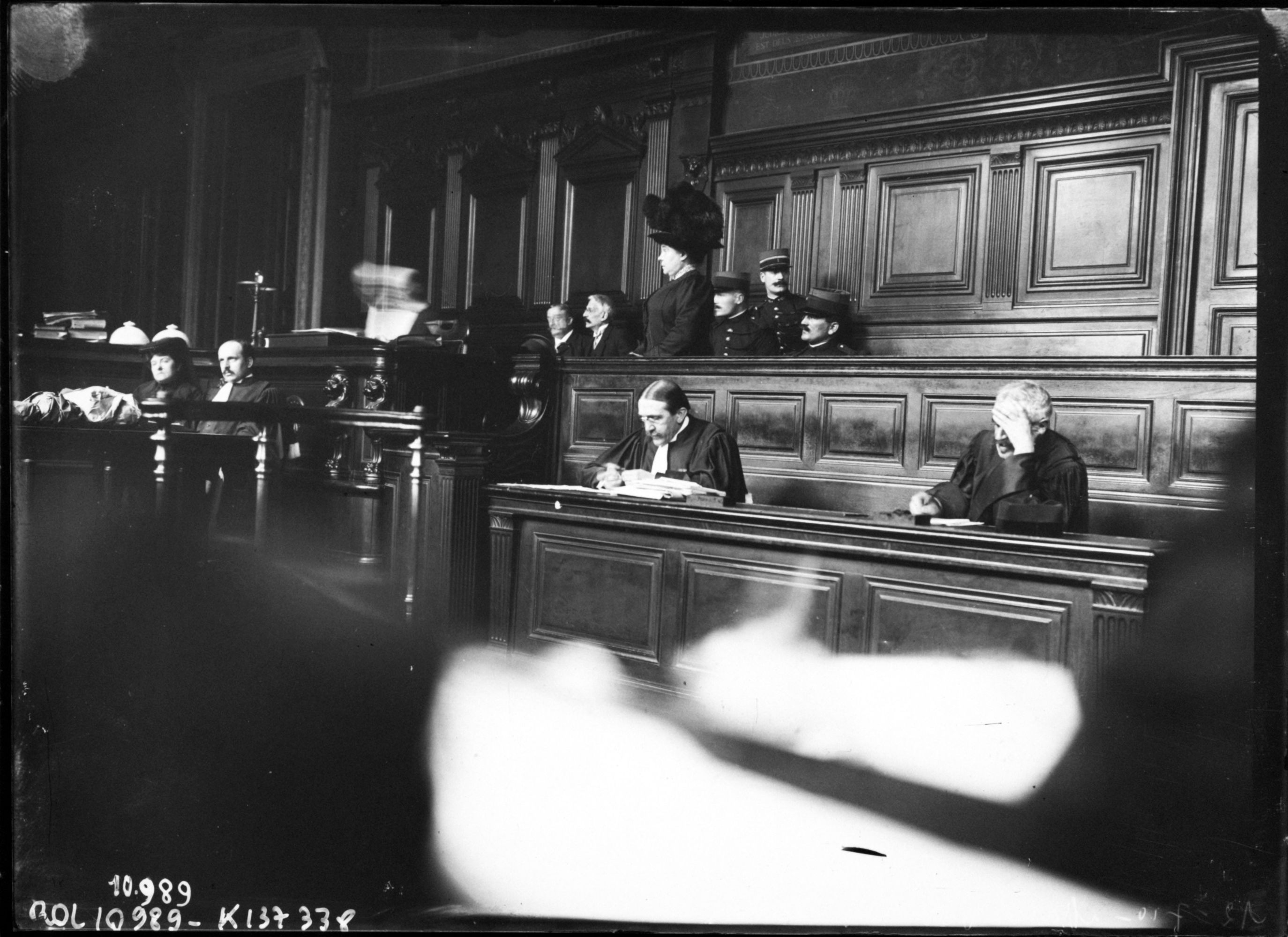 12-7-1910, Marie Bourette aux assises [condamnée au bagne à perpétuité pour empoisonnement] : [photographie de presse] / Agence Rol. Agence photographique, 1910.